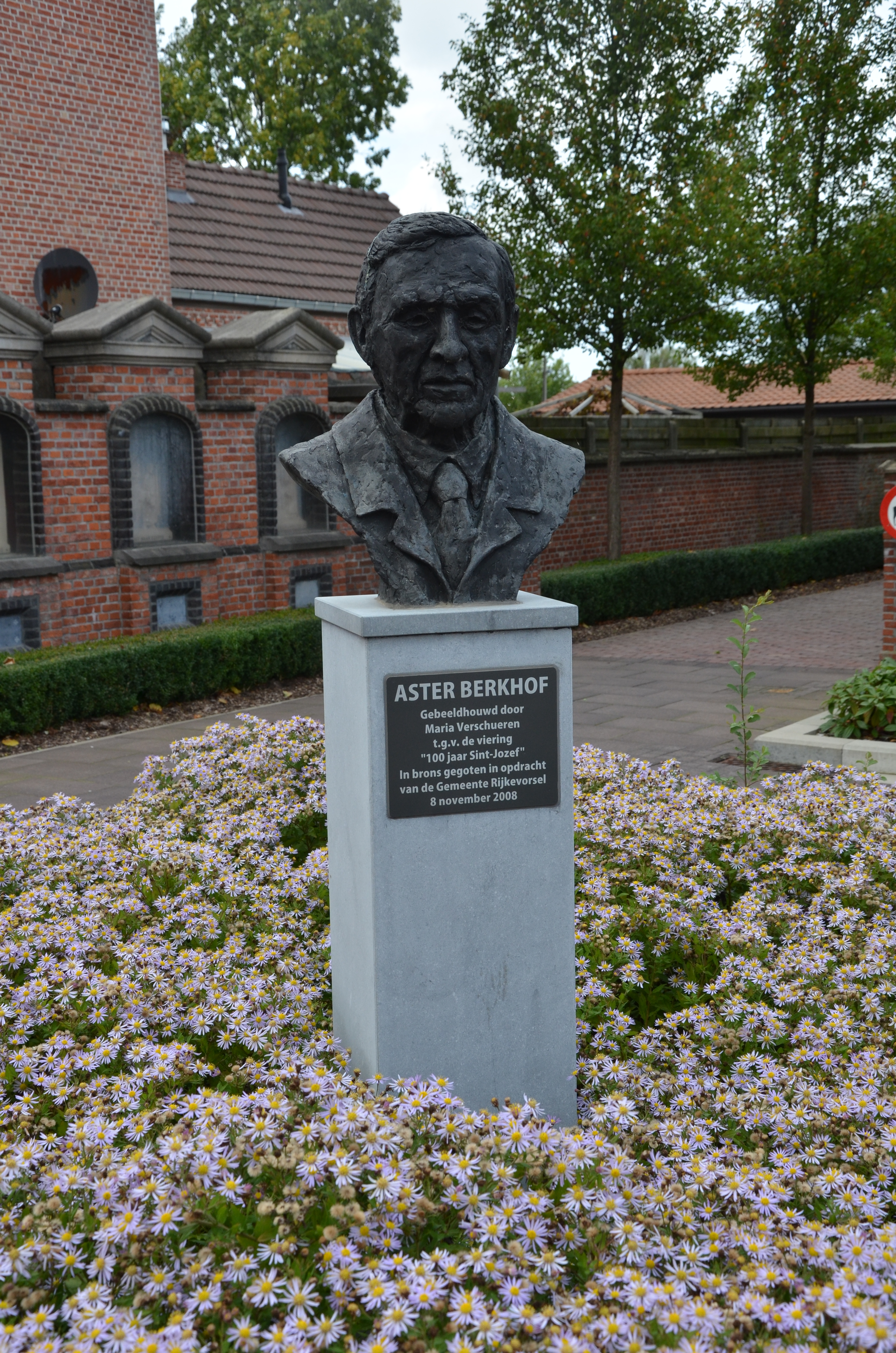 Borstbeeld Aster Berkhof in St-Jozef-Rijkevorsel